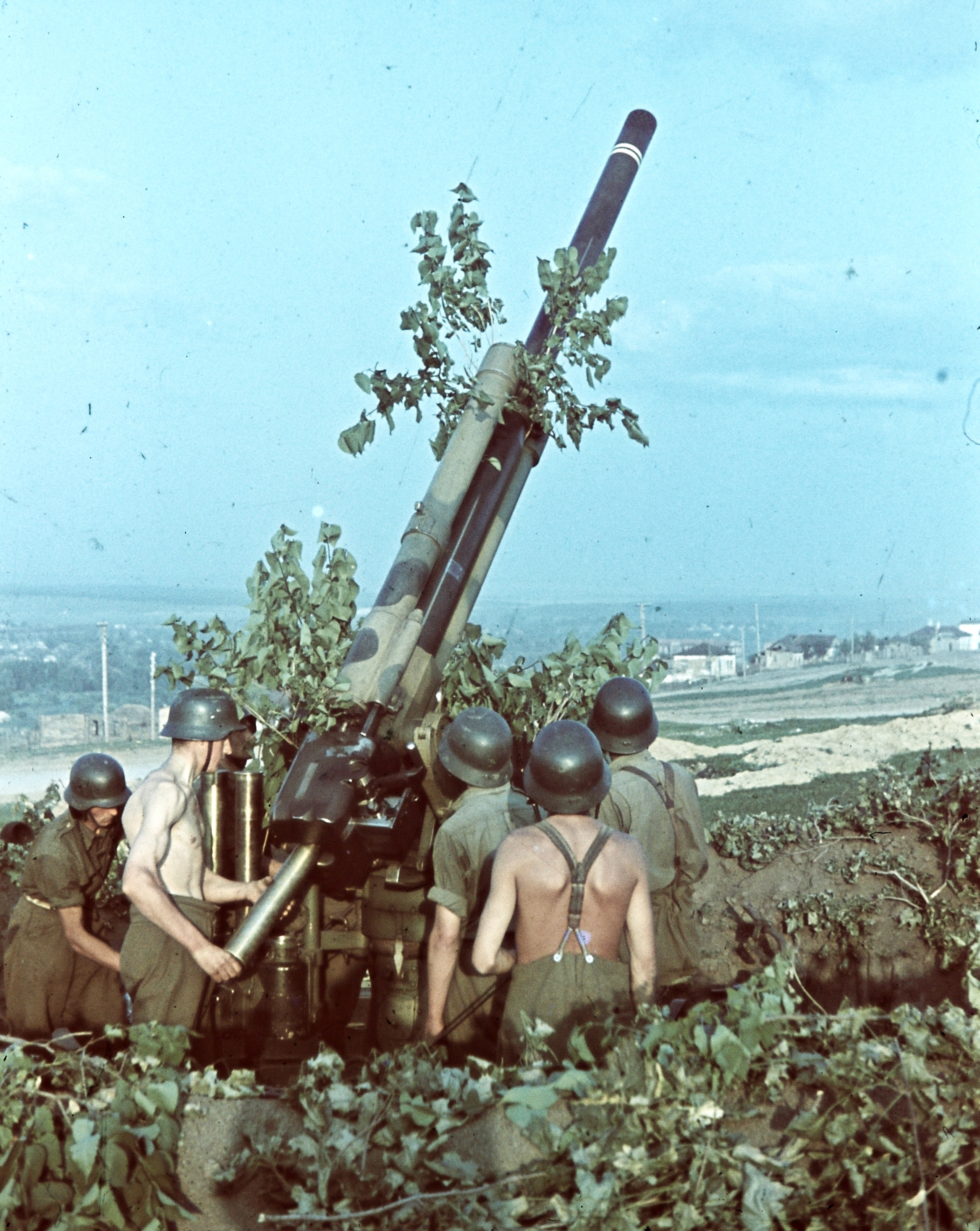 29M Bofors 80mm-es légvédelmi ágyú tüzelőállásban. Location: Russia, Stary Oskol Tags: colorful, soldier, second World War, ordnance, summer Title: 29M Bofors 80mm-es légvédelmi ágyú tüzelőállásban.